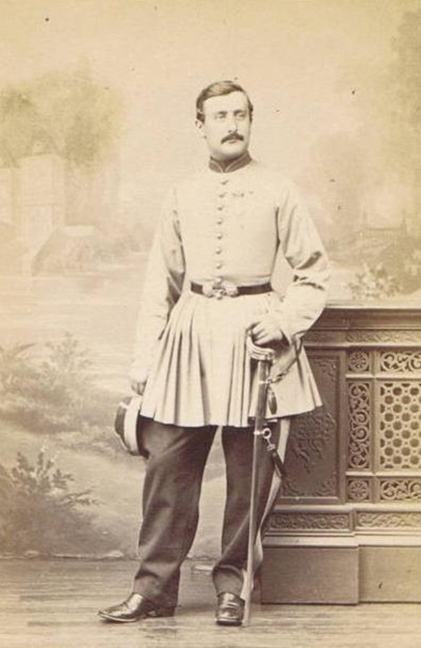 Photographie (Levitsky) représentant le Prince Napoléon-Charles BONAPARTE (1839-1899), 9e enfant de Charles-Lucien BONAPARTE et de Zénaïde BONAPARTE. Il sert dans l’armée française et fait les campagnes du Mexique et de 1870.